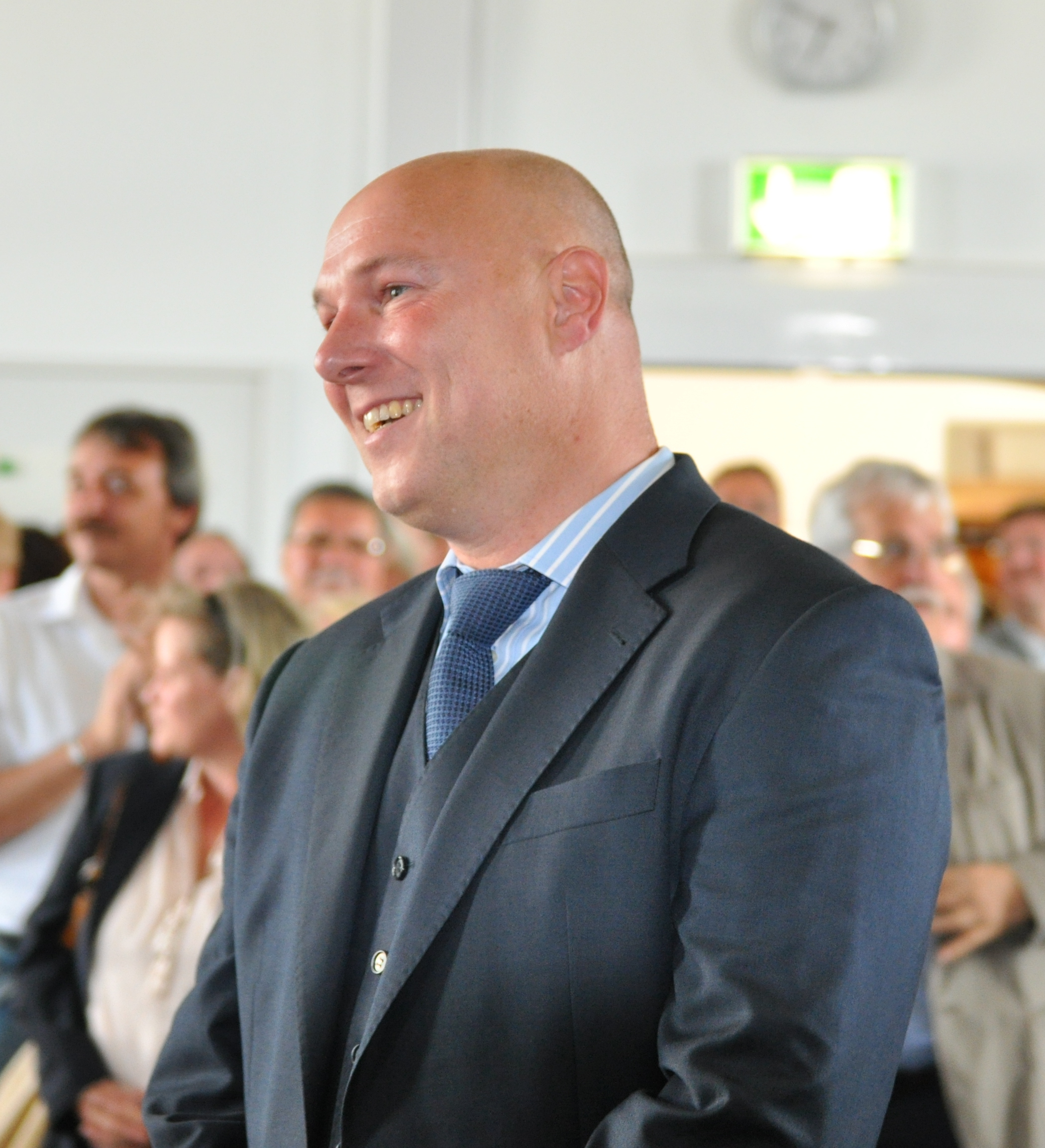 Dirk Lukrafka im Velberter Rathaus, kurz nach Bekanntgabe des Ergebnisses der Stichwahl zum Velberter Bürgermeister